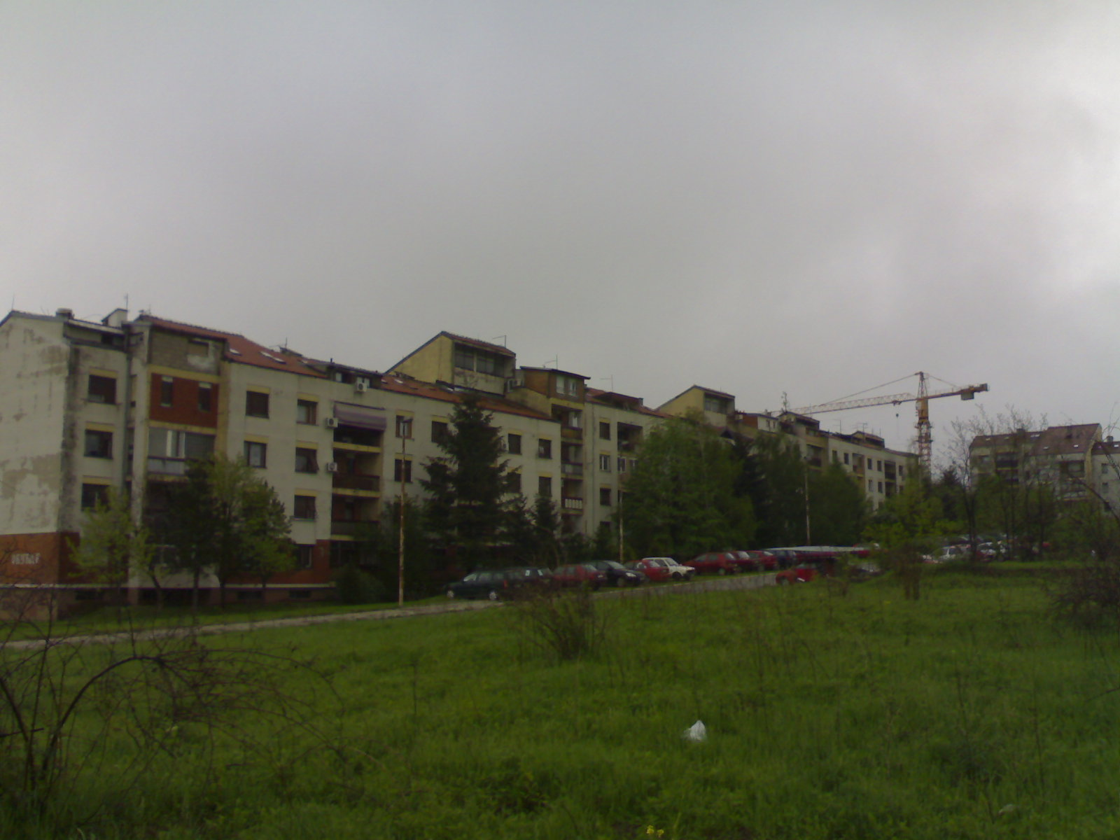 Сремчица насеље, сликано 25. 4. 2012. Licensing